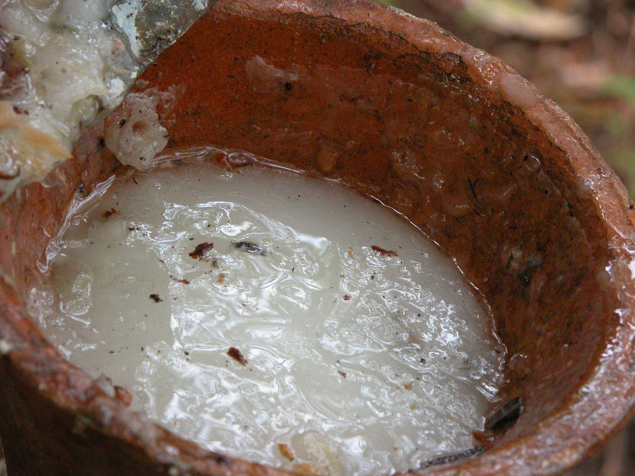 Gemme dans un pot de résine, photo personnelle prise à La Teste de Buch